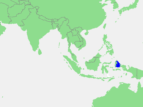 Halmahera Sea